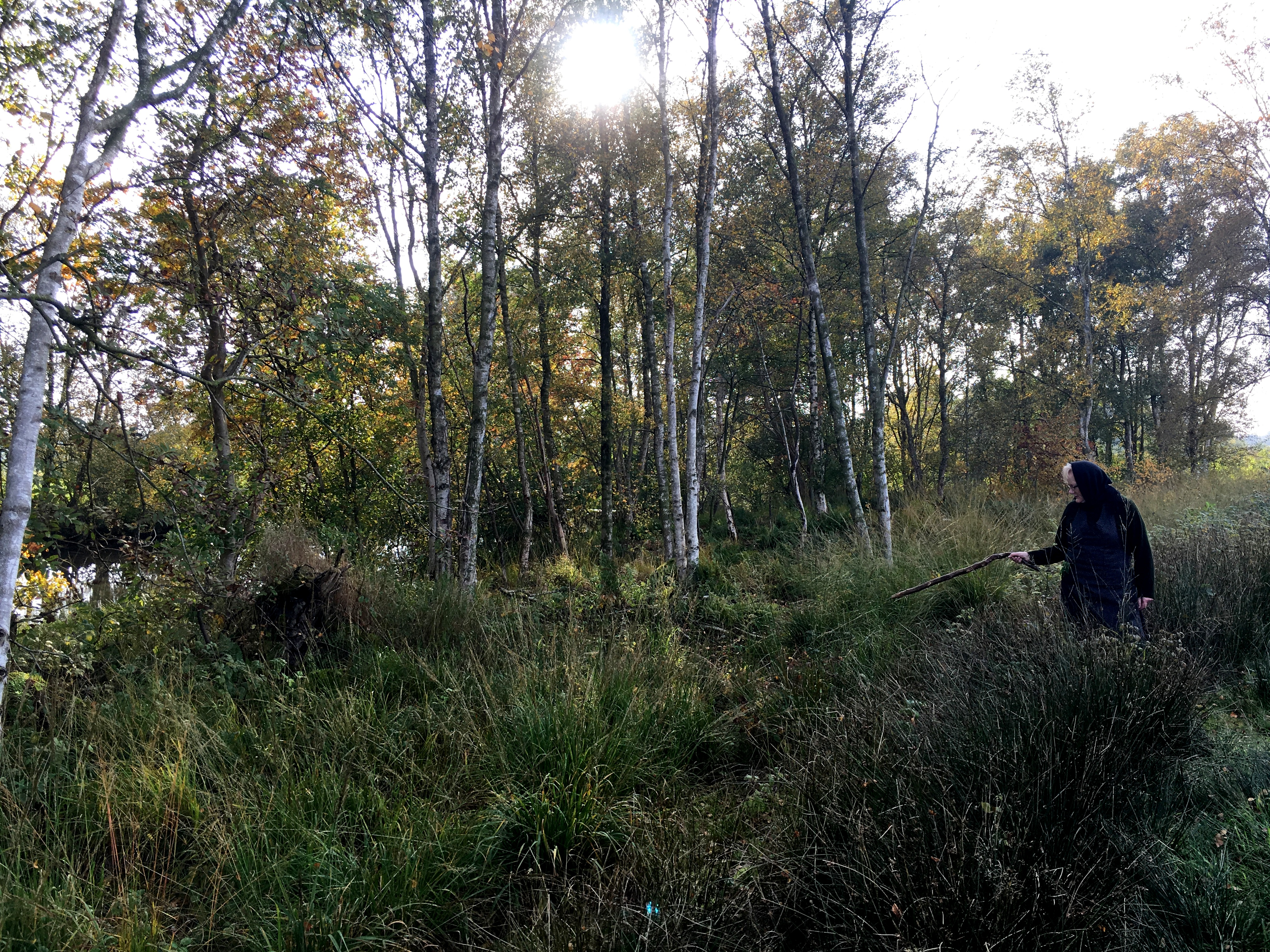 Natur erleben im Offenbütteler Moor